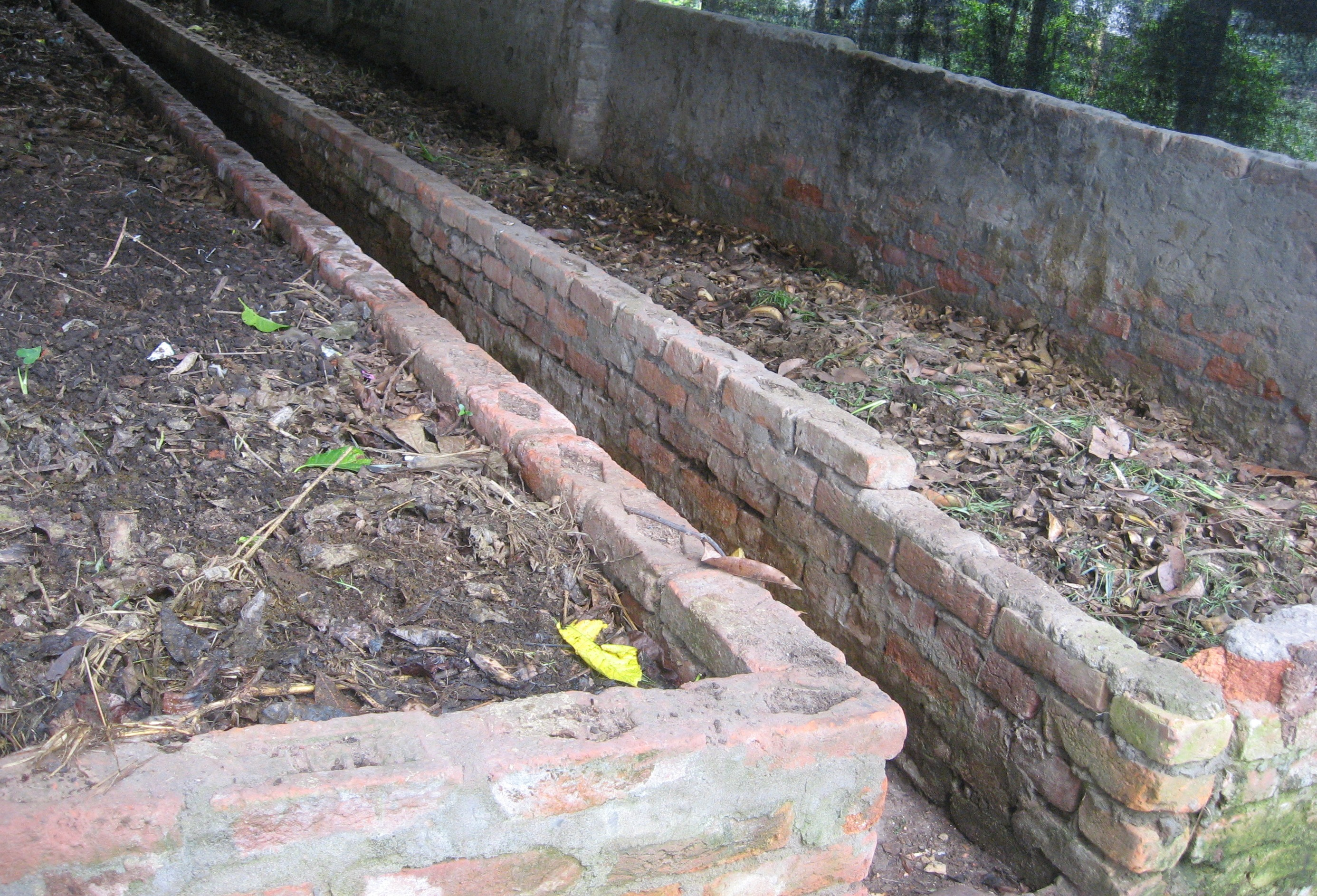 অসমীয়া: কেঁচুসাৰৰ টেংক/চৌবাচ্চা